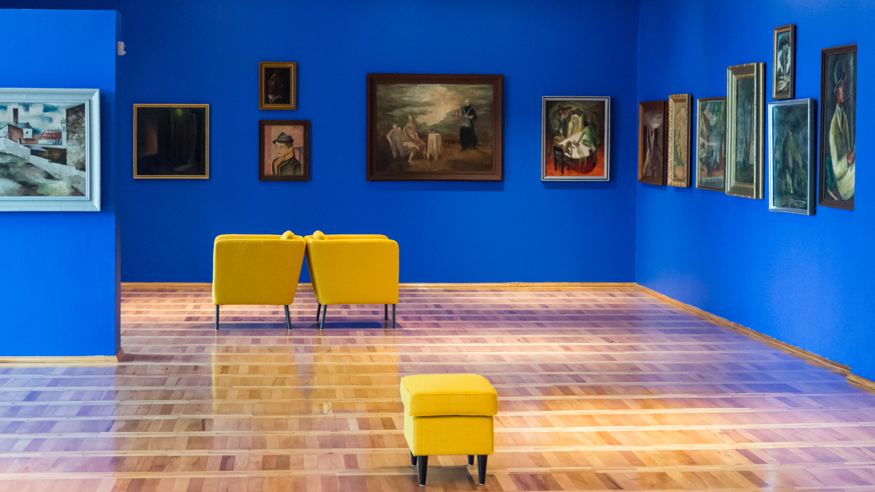 Wystawa stała Galeria Malarstwa Polskiego